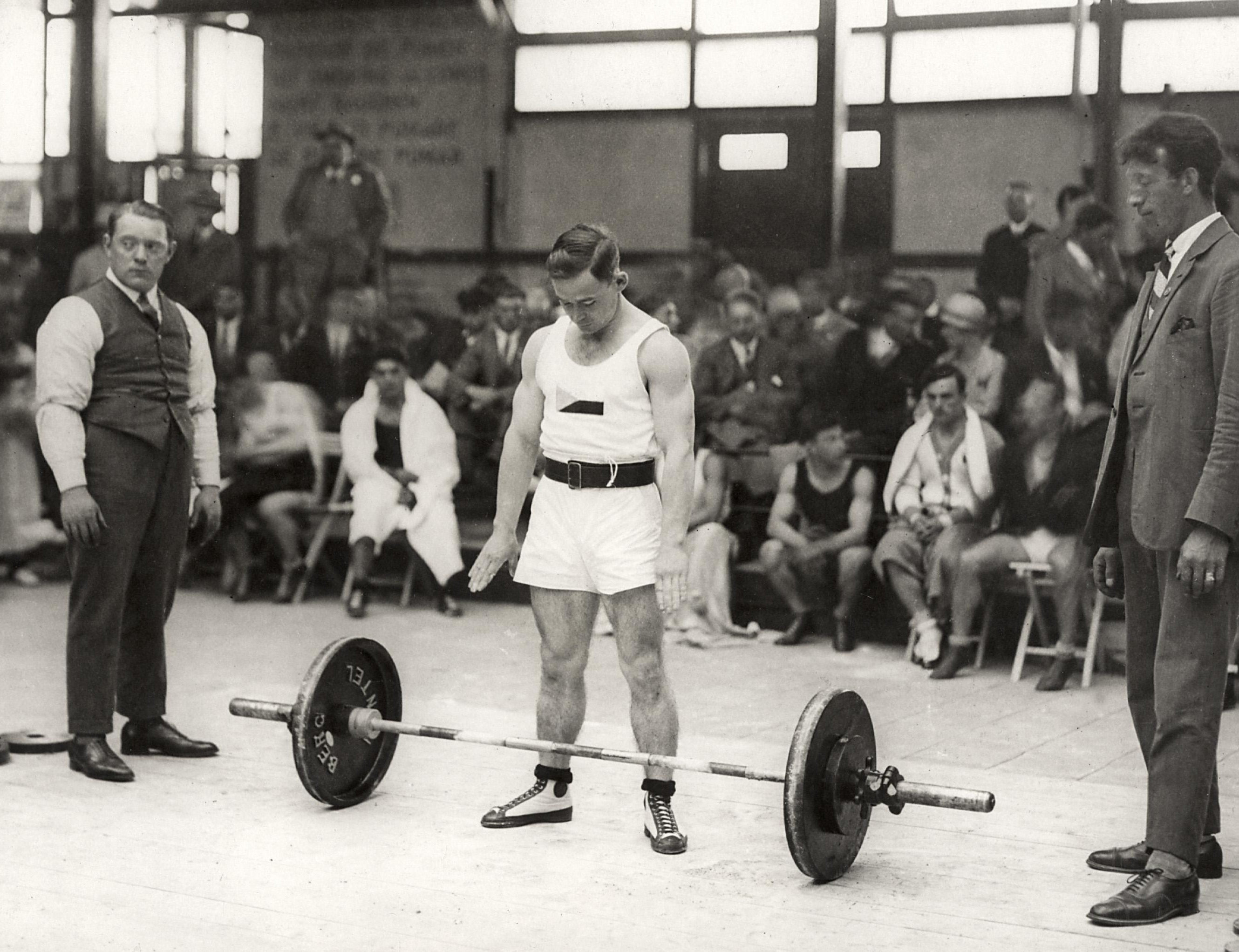 Sport, Olympische Spelen 1928, Amsterdam : De Tsjechoslowaakse gewichtheffer Matisjek in actie.